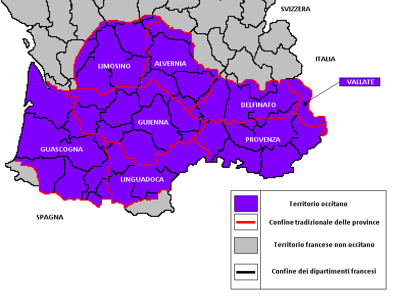 Mappa in italiano rappresentante le province dell'Occitania.